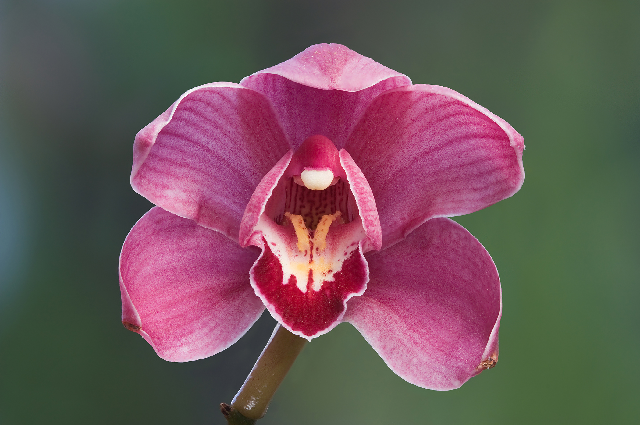 1.2 only